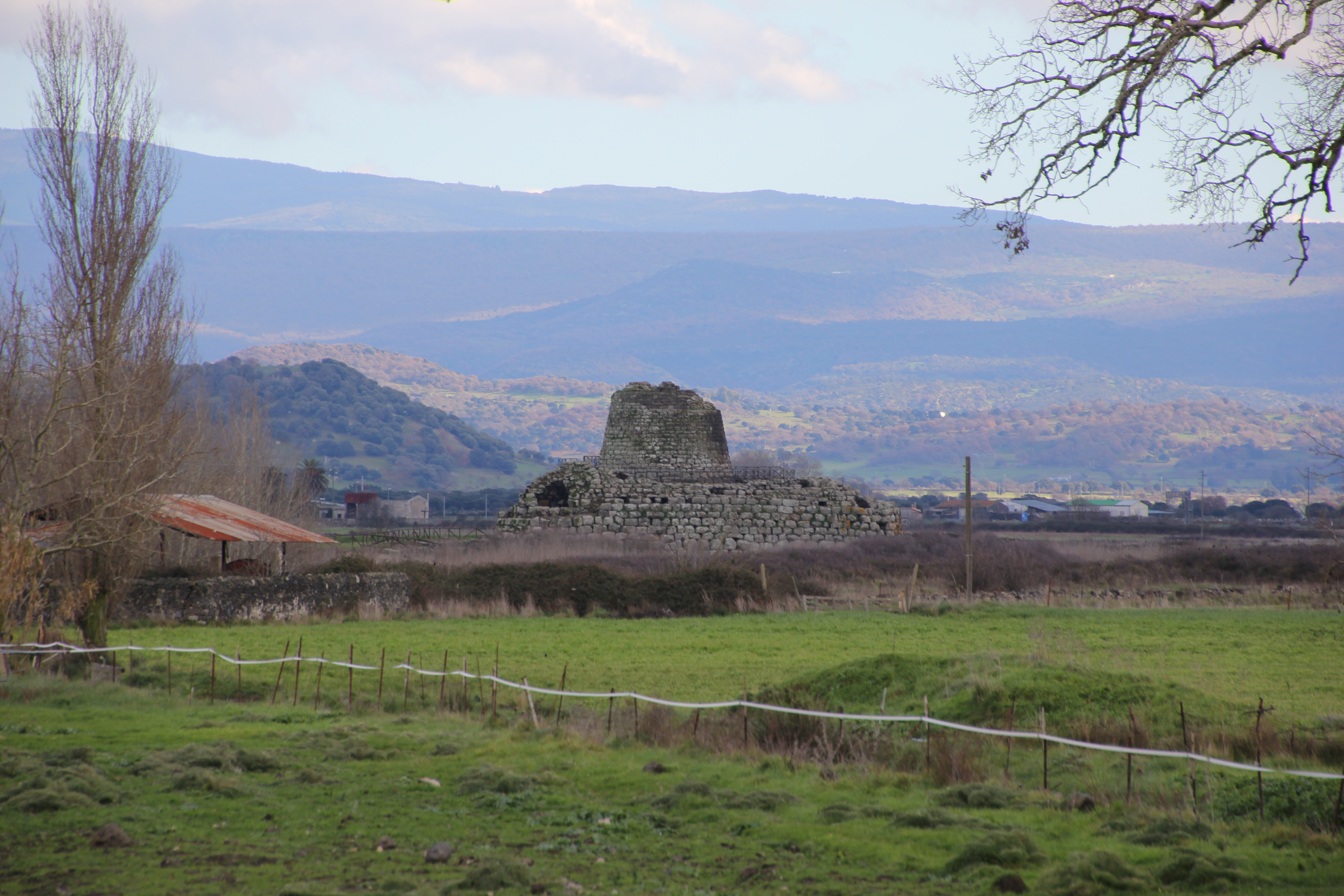 Torralba, nuraghe Santu Antine